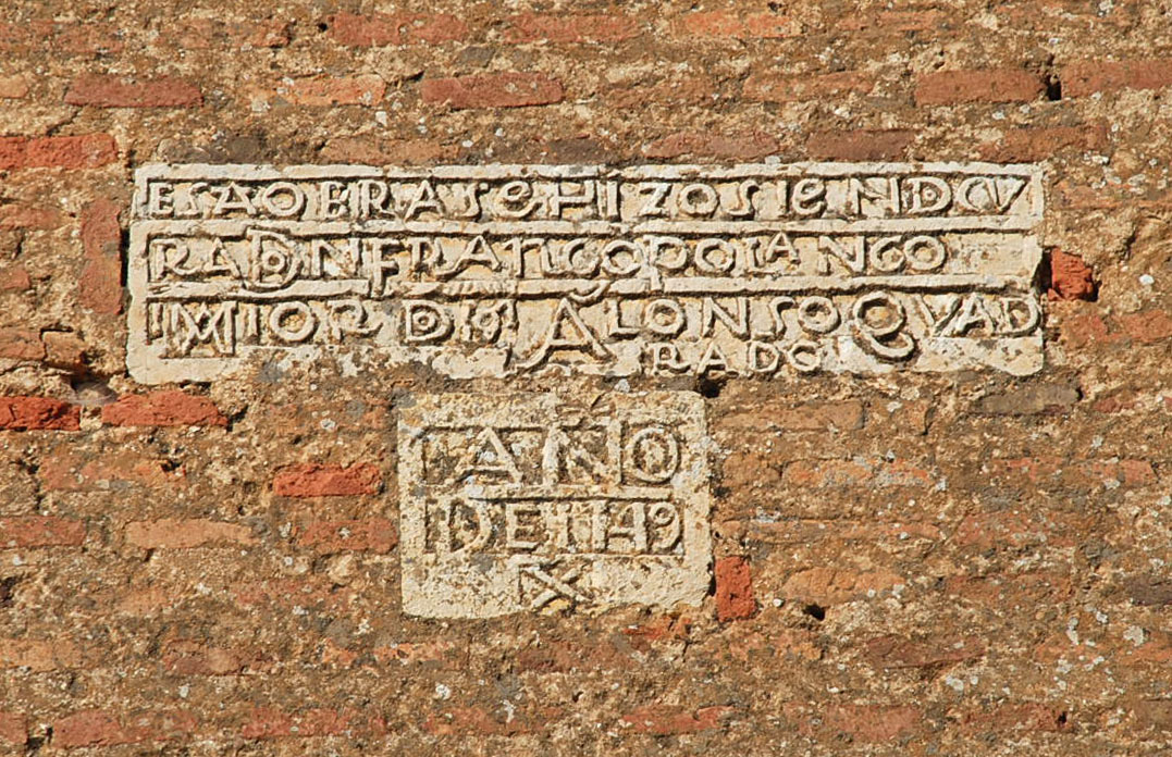 Lápida conservada en la cabecera de la Iglesia de San Andrés Apóstol en la que se puede leer: ESTA OBRA SE HIZO SIENDO CURA DON FRANCISCO POLANCO MAYORDOMO ALONSO QUADRADO. Debajo otra pequeña lápida con la fecha de la misma: AÑO DE 1749.